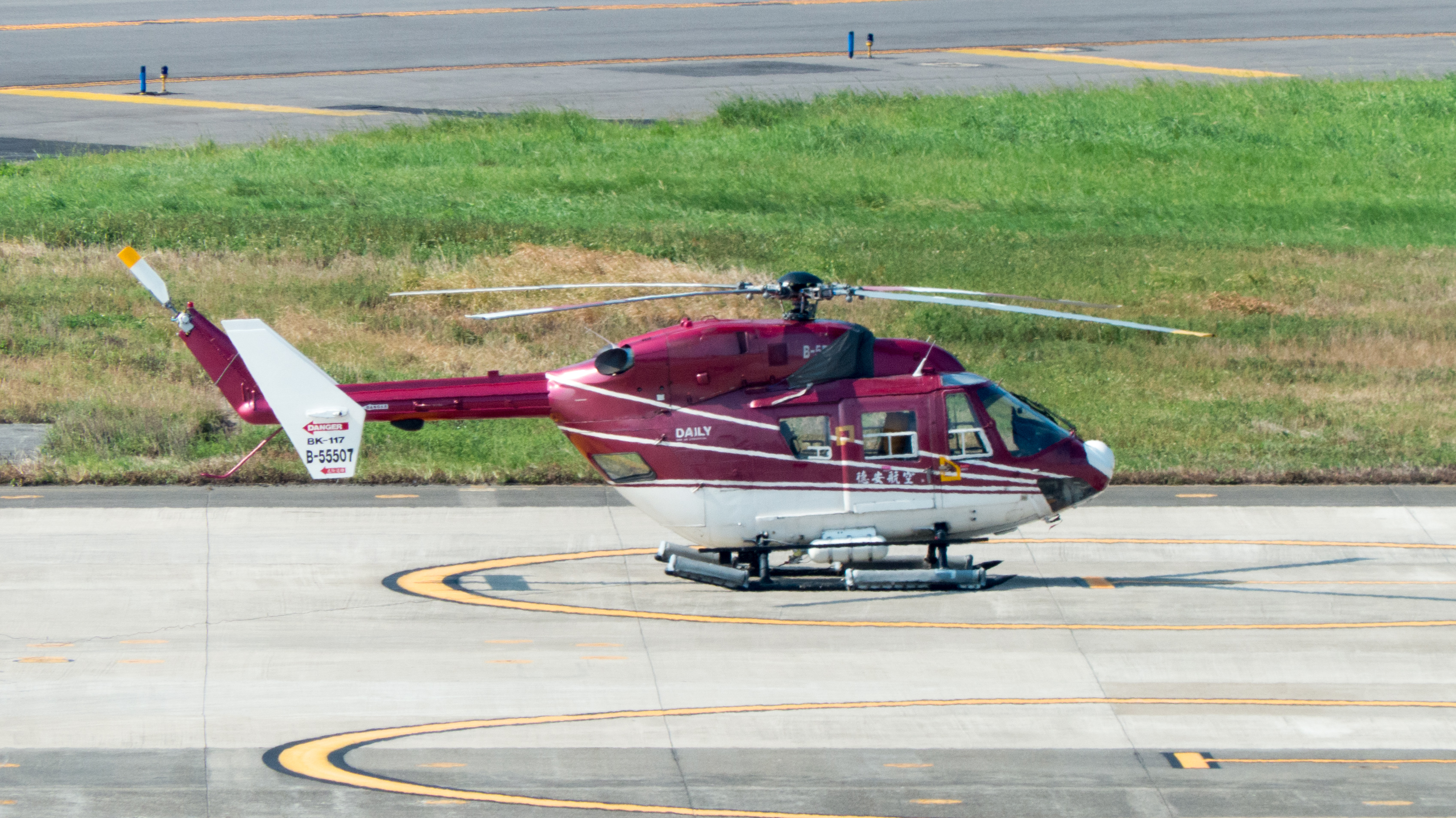 德安航空BK-117B-2 B-55507停放臺北松山機場西南直升機停機坪。